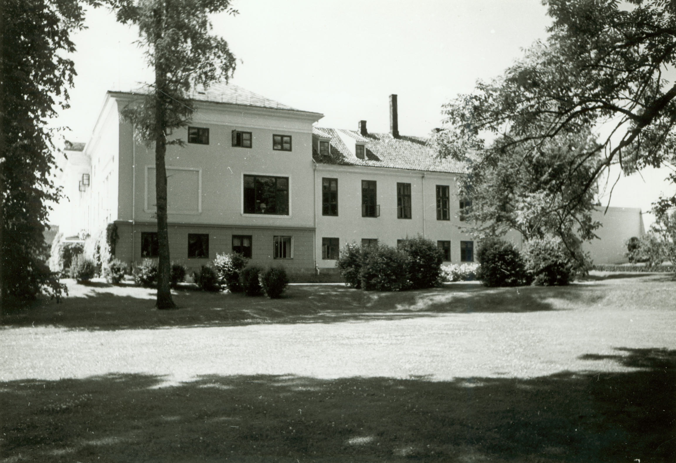 Fossum Nordre i Gjerpen, Telemark Byggeår 1811. Arkitekter var Christian Frederik Hansen og Johan Gottfried Böydler. Fredet i 1924. This image on crowdsourcing geotagging platform Fotodugnad